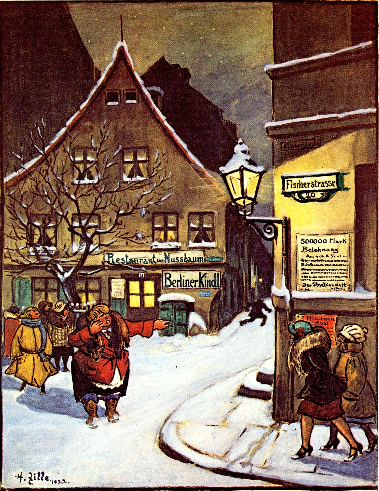 Postcard